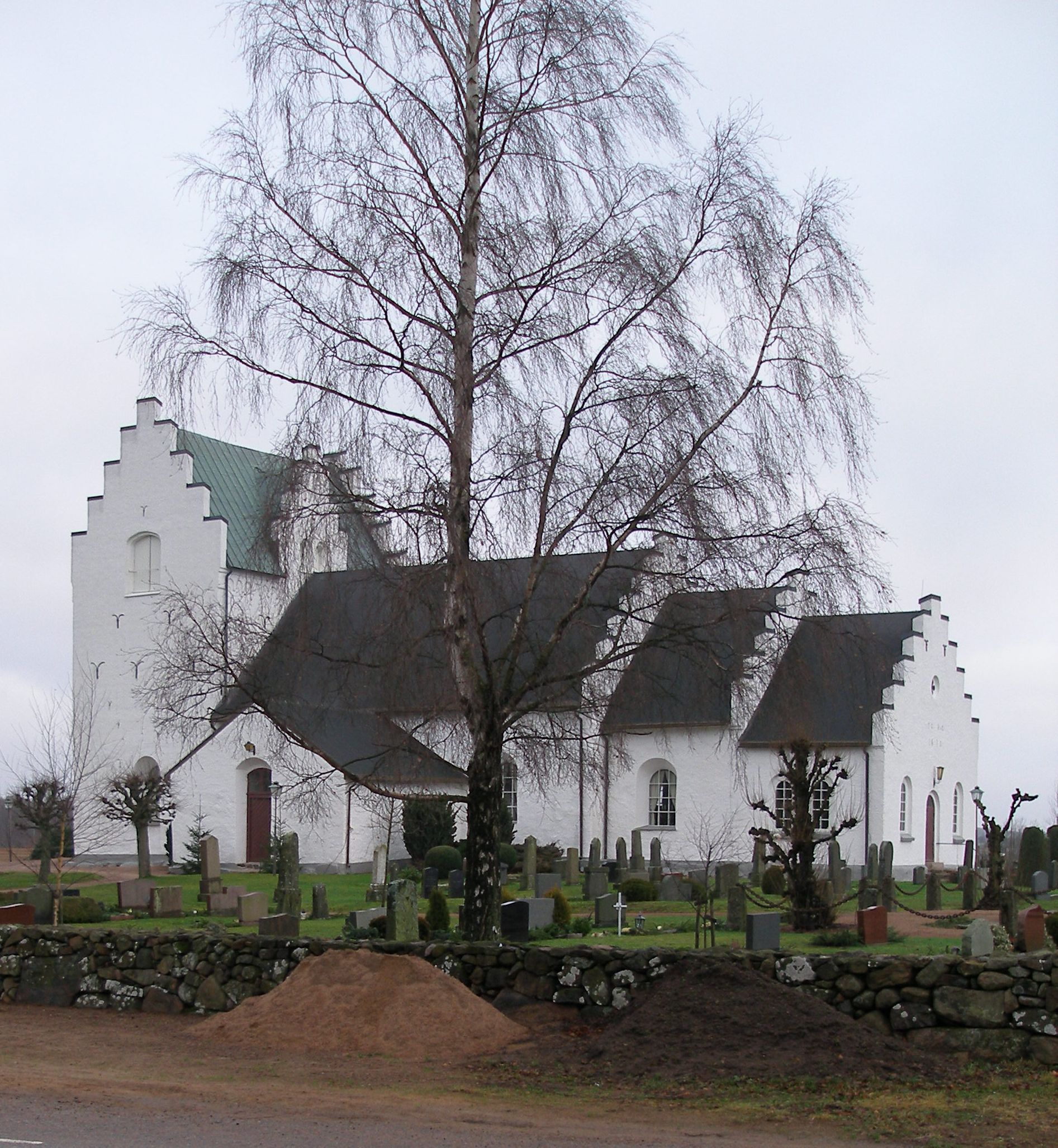 Bild på Våxtorps kyrka, tagen julafton 2006.